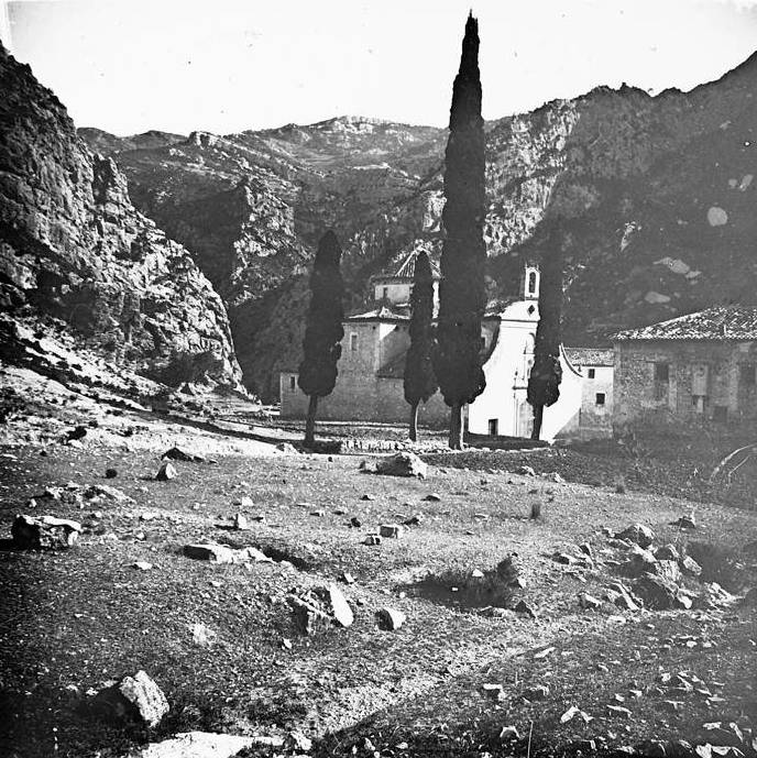 Vista de l ' ermita de la Fontcalda a contrallum. Josep Salvany i Blanch (1922)